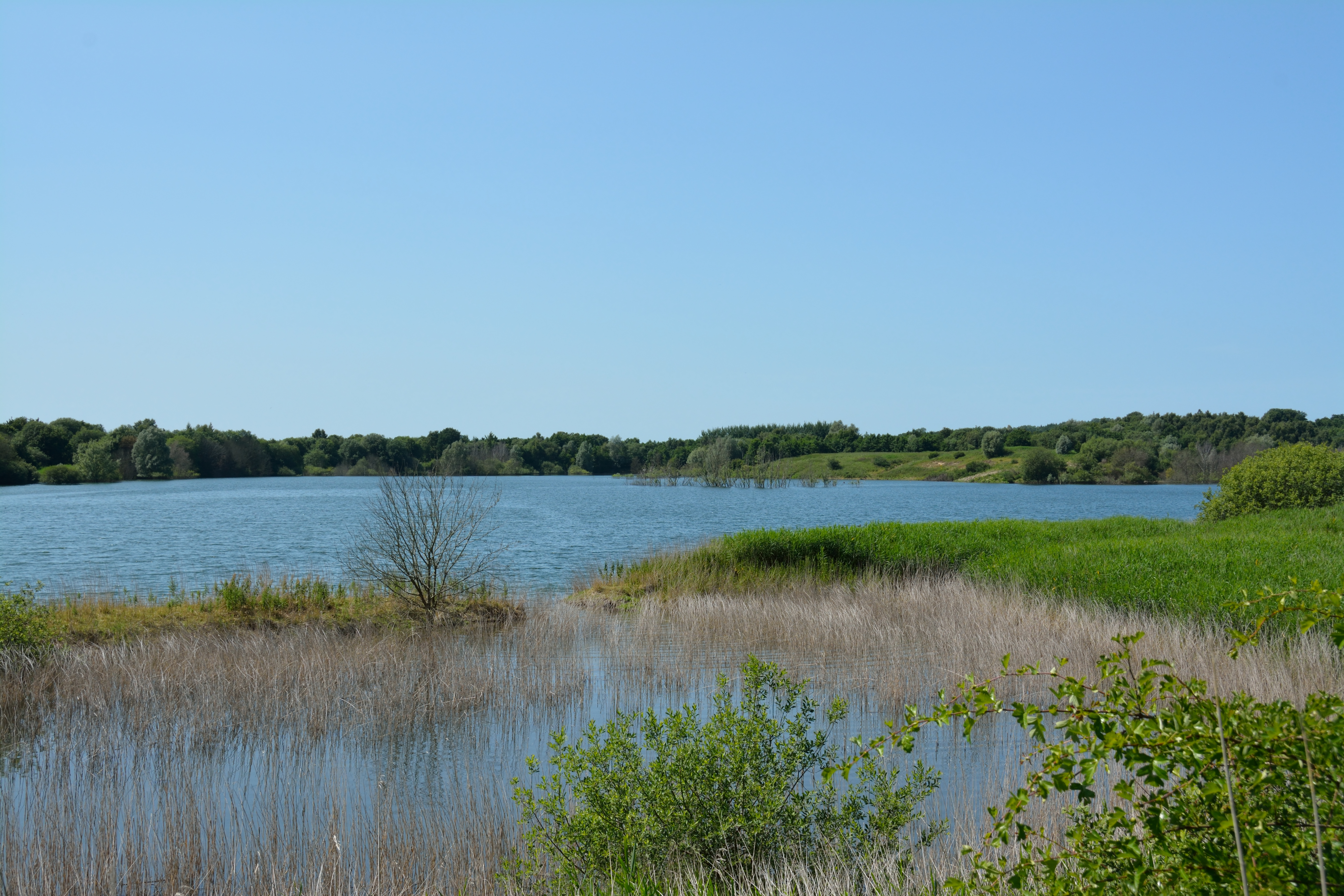 Die Tongrube Muldsberg ist ein ehemaliger Tagebau der Breitenburger Portland-Cement-Fabrik (heute Holcim) in der Gemeinde Mehlbek. Die Grube füllt sich allmählich mit Grundwasser, es entsteht ein künstlicher See. Ein Rundweg von ca. fünf Kilometer Länge führt rund um den See. Impressionen am See